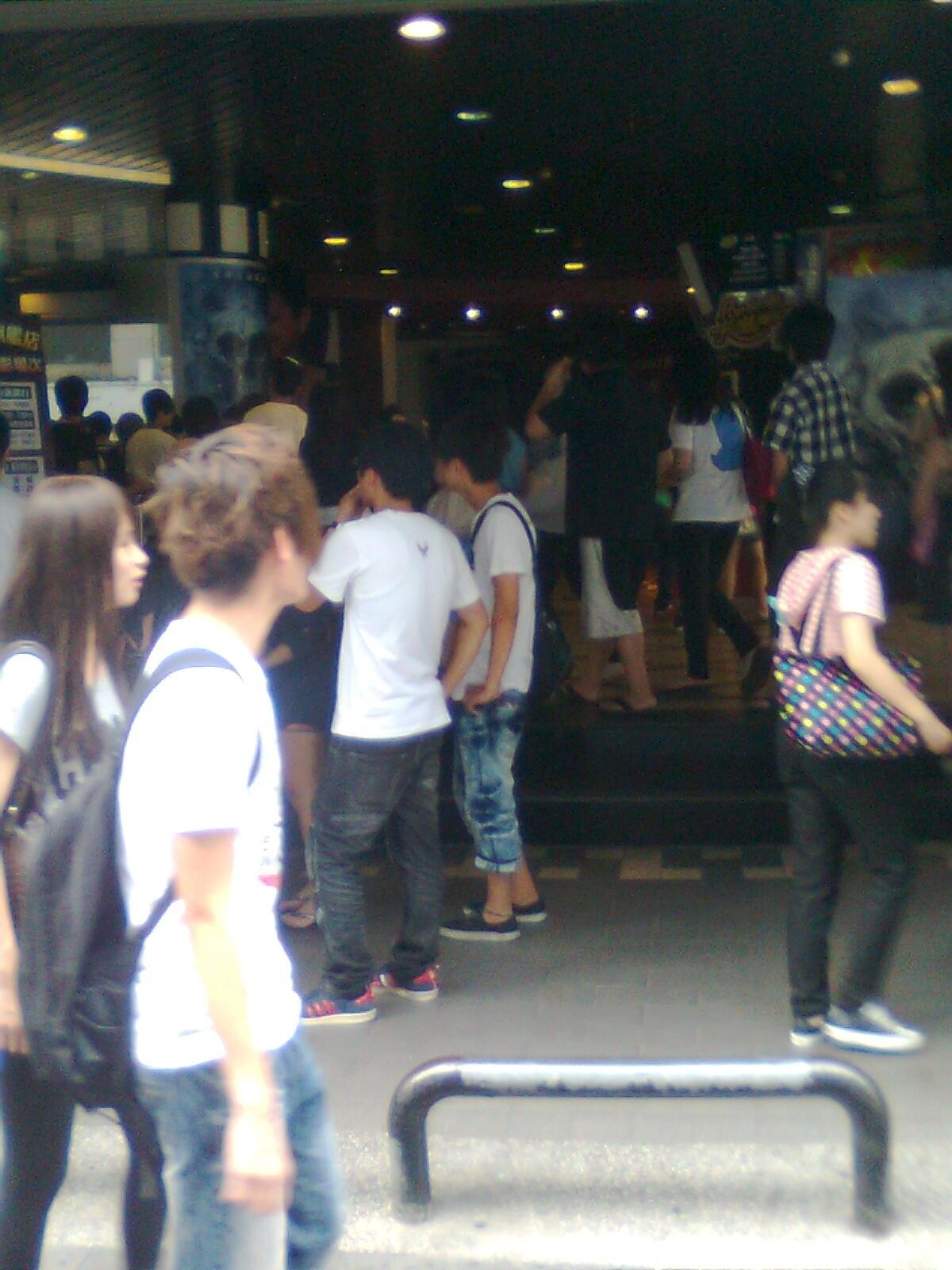 在西門町等候觀看國片的人潮。